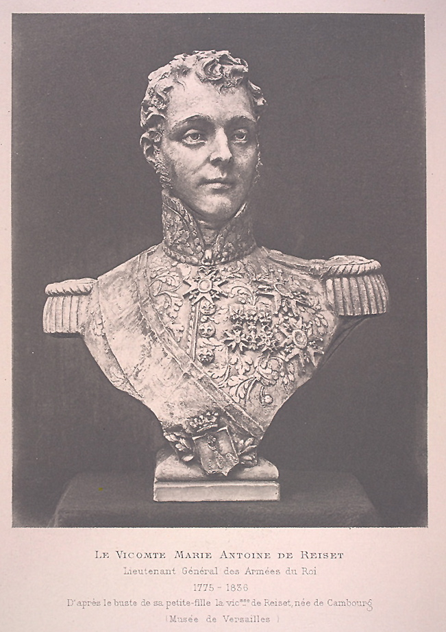 Marie Antoine, vicomte de Reiset (1775-1836), Lieutenant Général des Armées du Roi